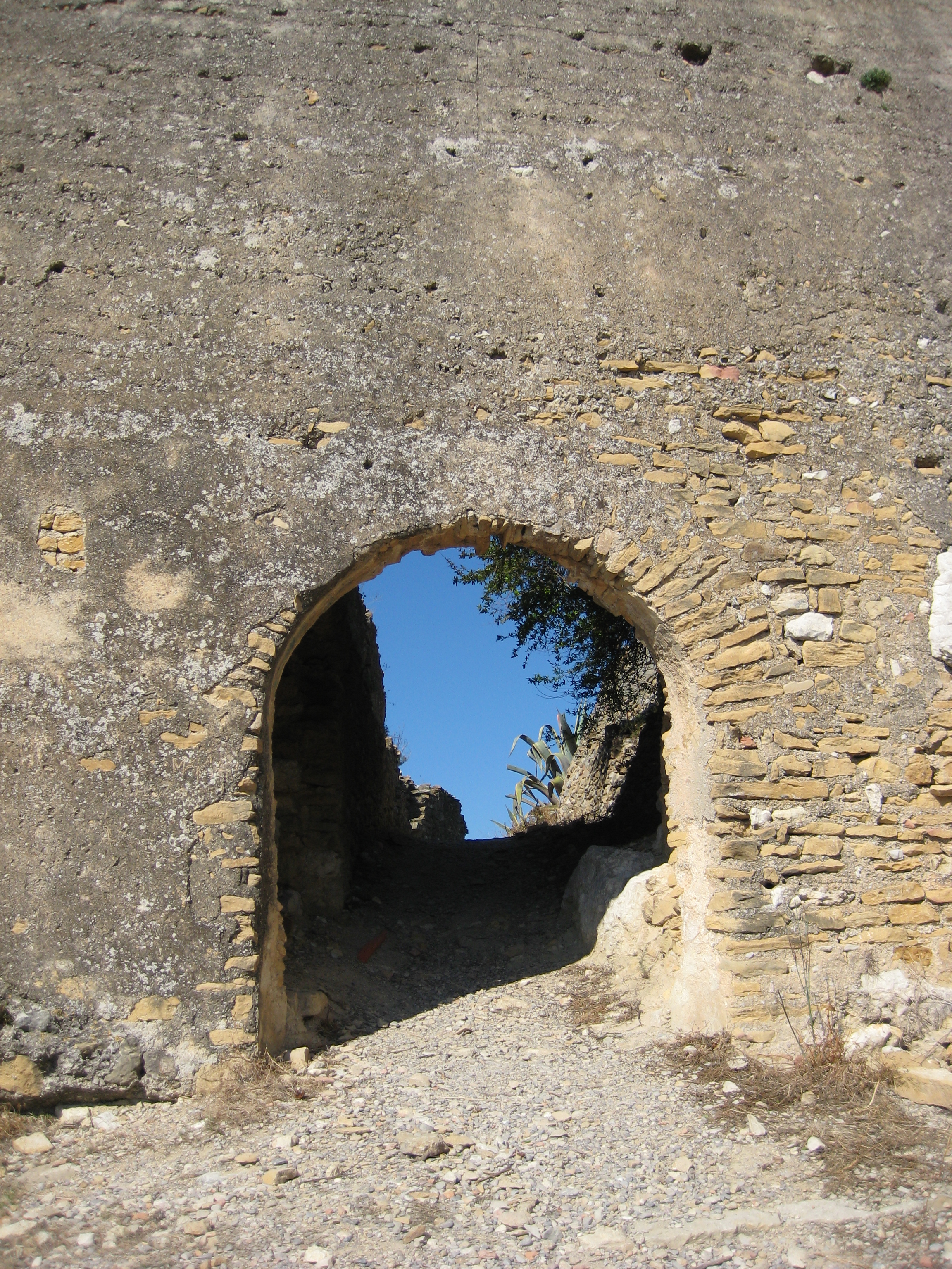 Porta d'accés al castell de Cervera del Maestrat (Baix Maestrat)